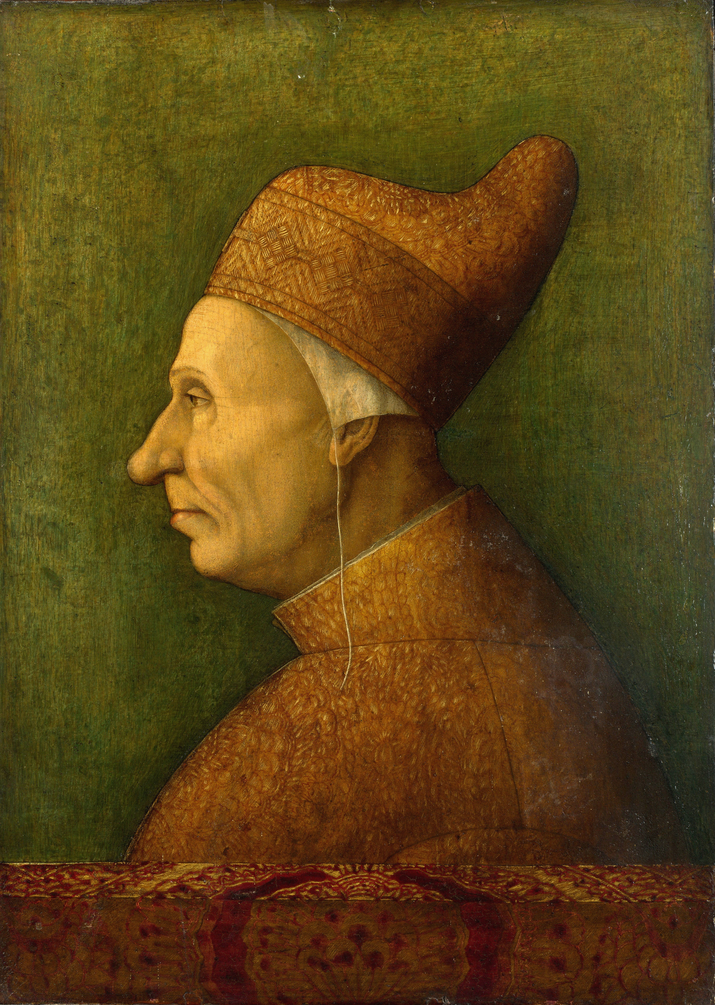 Doge Niccolò Marcello, NG London